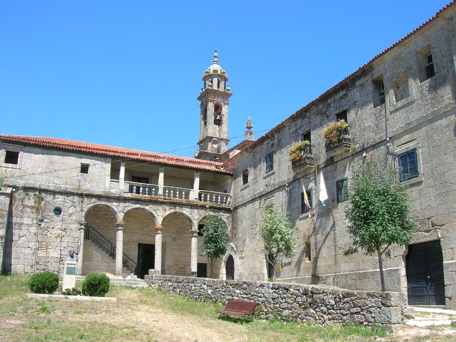 Mosteiro de Santa María de Xunqueira de Espadañedo